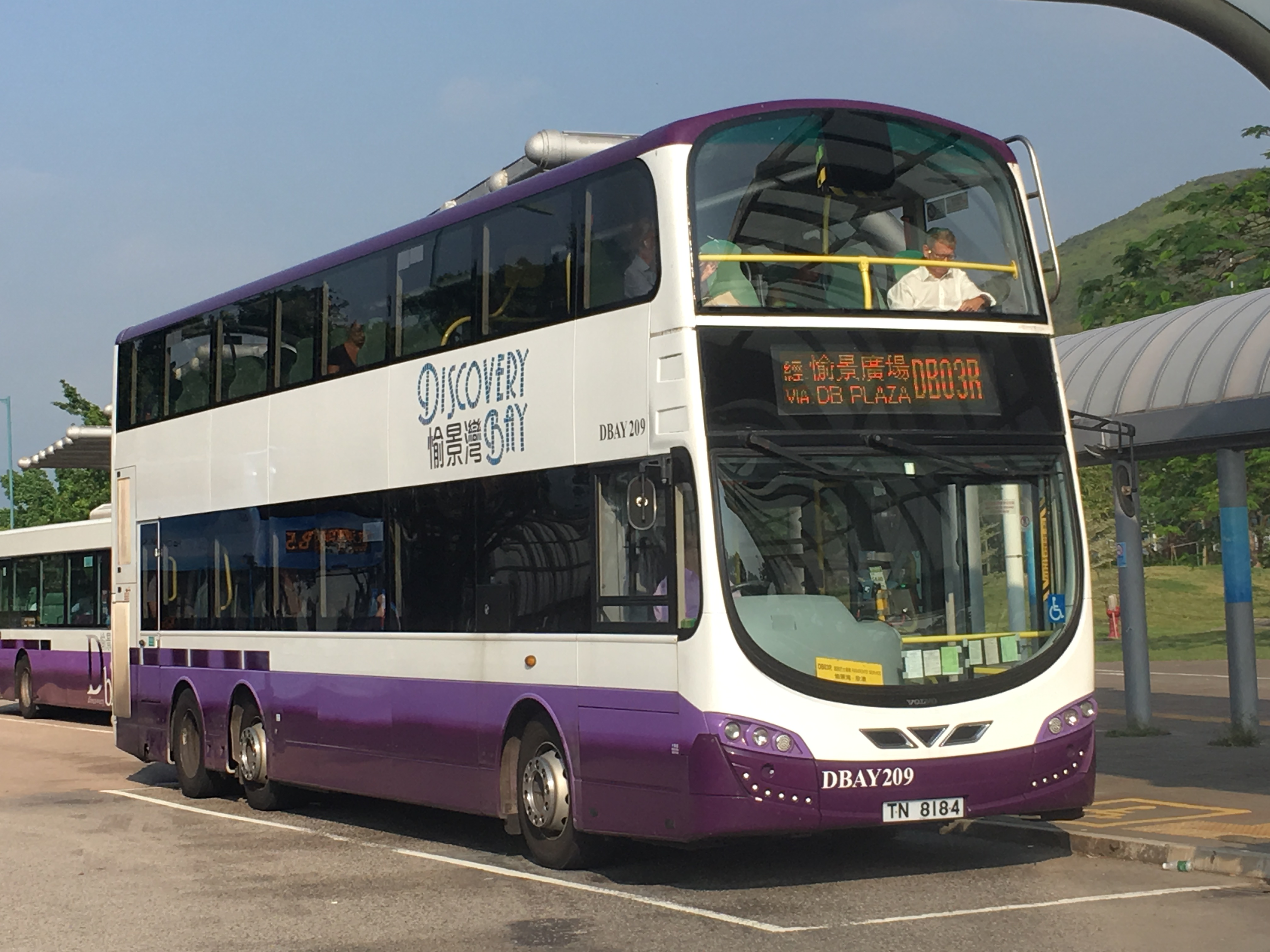 This photo is taken in Sunny Bay Station.